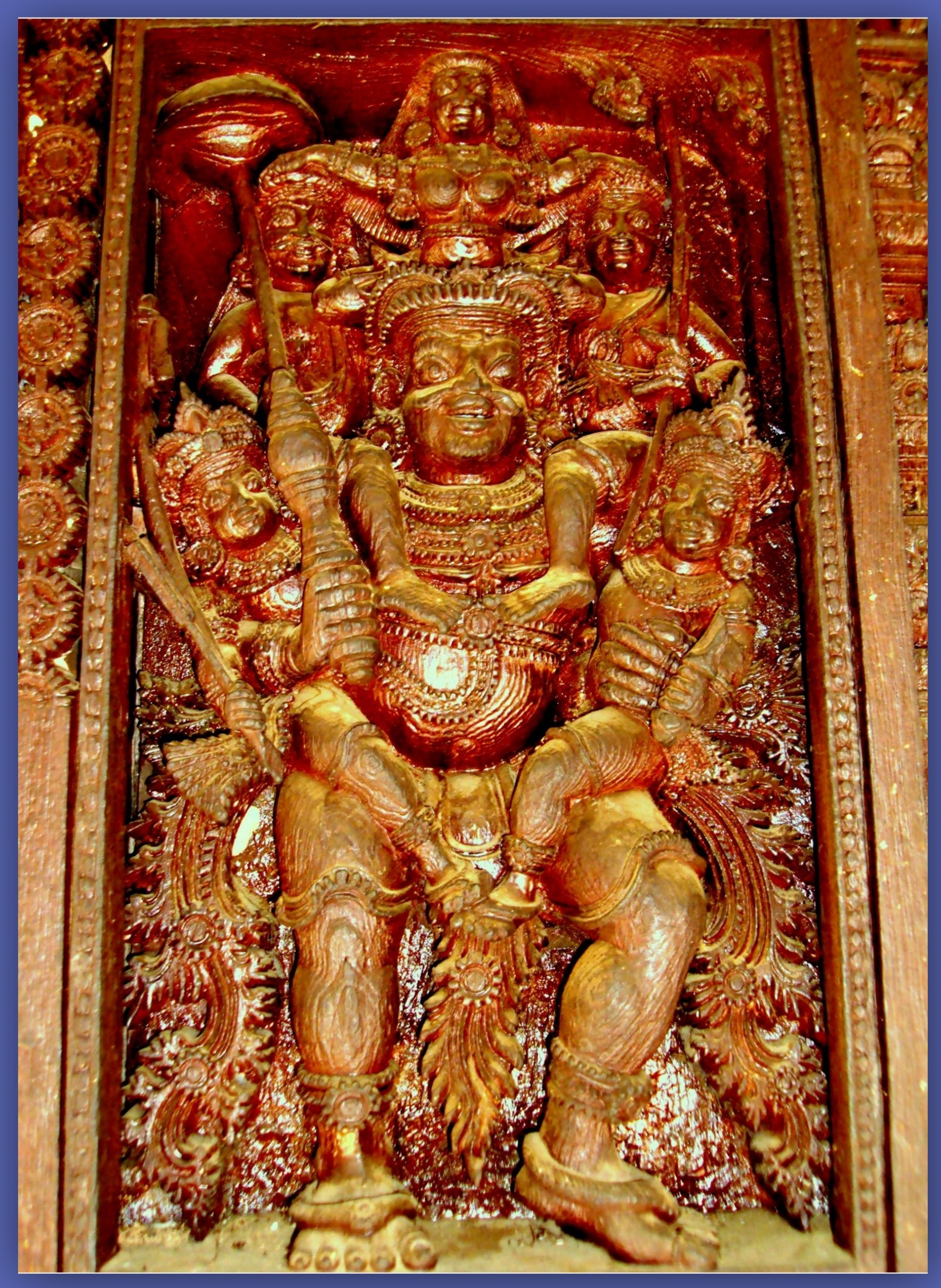 Bhima + Bros, Ma (അമ്മയേയും, സഹോദരങ്ങളേയും എടുത്തുകൊണ്ടുള്ള യാത്ര - അരക്കില്ല ദഹനത്തിനുശേഷം) -- വാഴപ്പള്ളി ക്ഷേത്രം ദാരുശില്പം